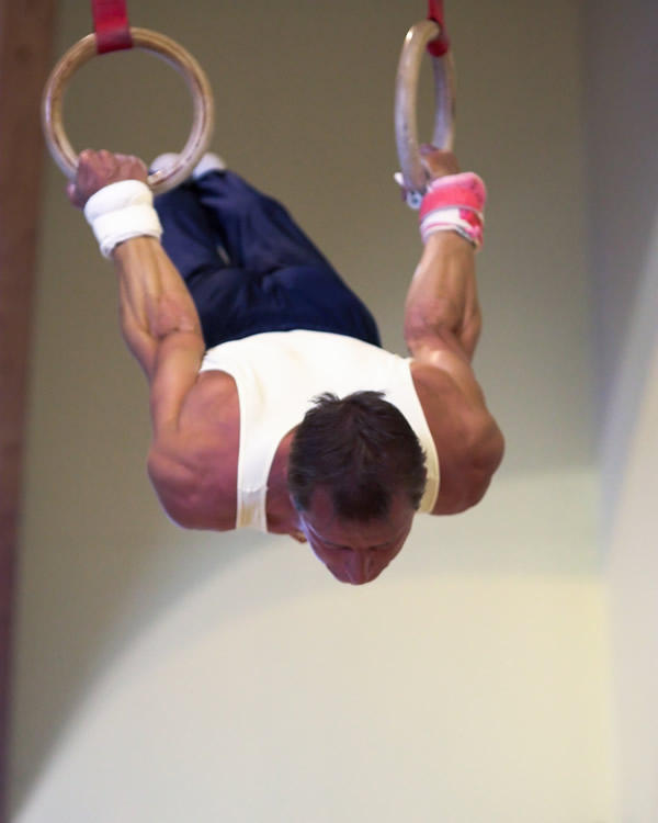 Figure on still rings.